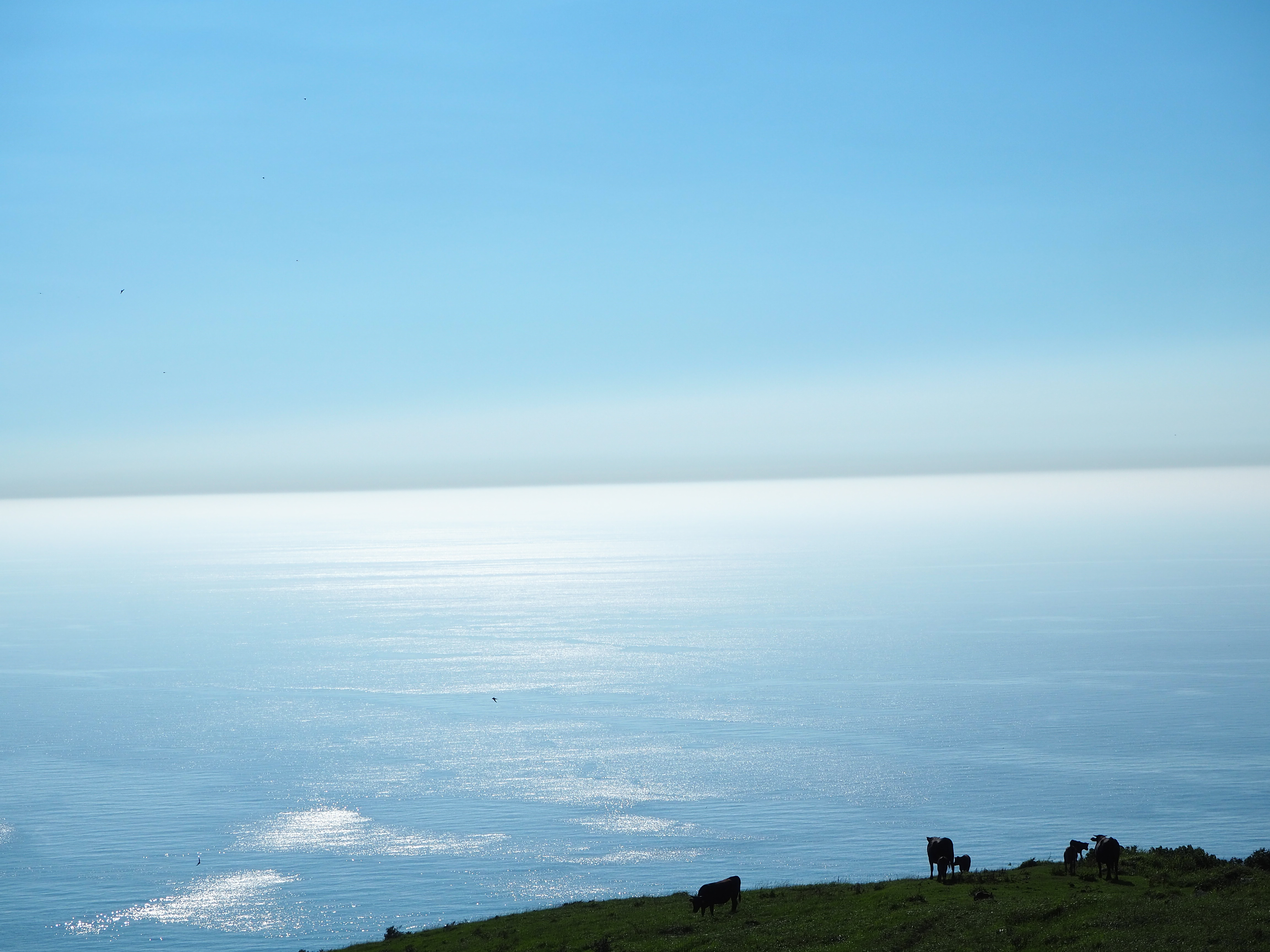 赤尾展望台上からの水平線Olympus E-M10 Mark III